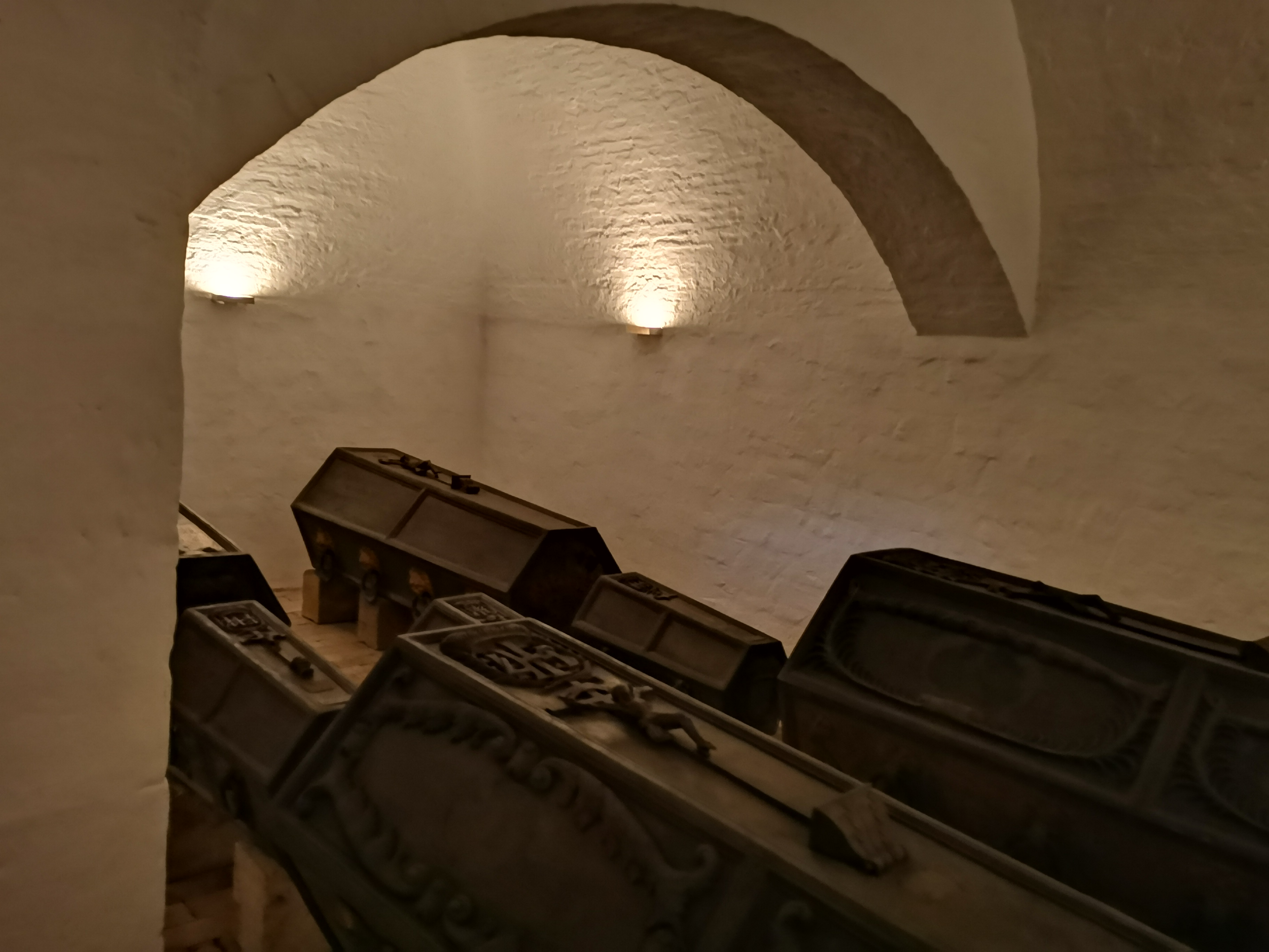 Fürstengruft Weimar, Särge von Herzogin Christiana Elisabetha (1638–1679), Herzog Johann Ernst II (1627–1683) (vorn von links nach rechts); Mitte: Prinzessin Eleonora Christiana (1689–1690), Prinz Johann Wilhelm (4. Juni 1686 – 14. Oktober 1686), Prinzessin Johanna Augusta (1690–1691) (von links nach rechts); hinten: Herzog Johann Ernst III. (1664–1707)